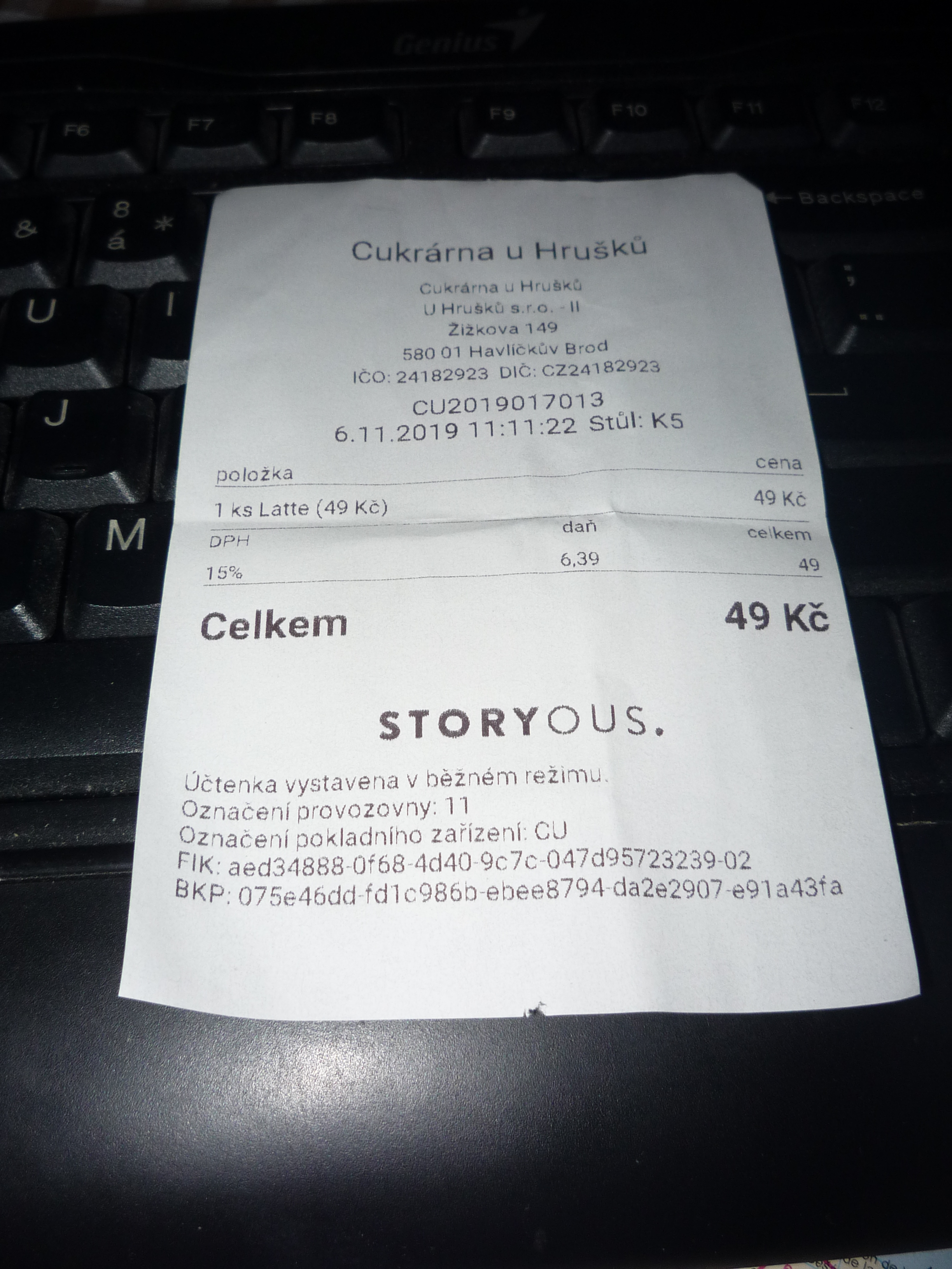 Autor fotografie Jiří Zelenka. EET účtenka. Kavárna U Hrušků. Žižkova ulice. Havlíčkův Brod. Kraj Vysočina. Czech Republic.